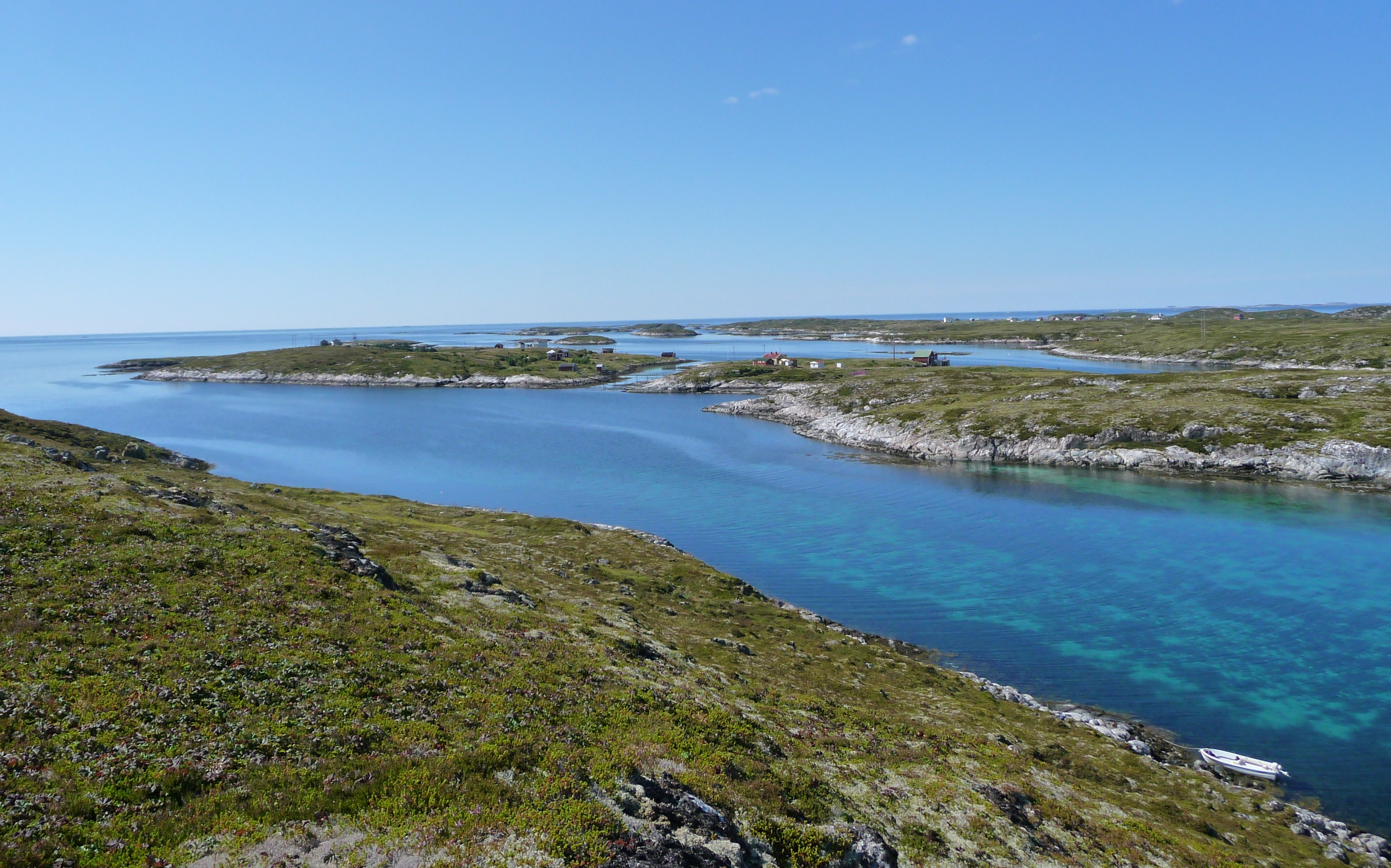 Gåsvær sett i fra Ravnøya